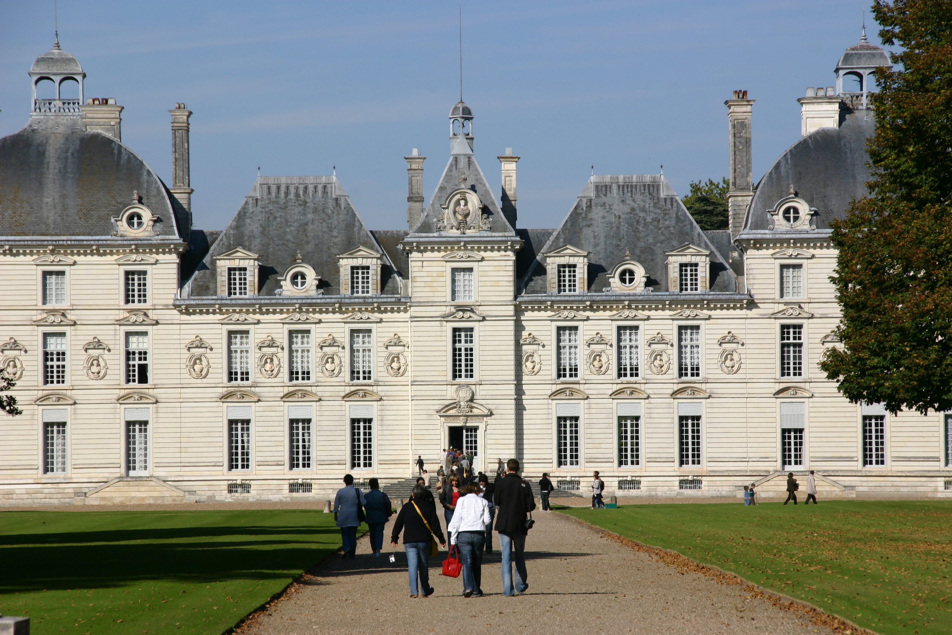 Château de Cheverny